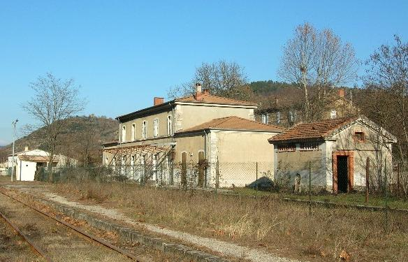 La Gare de Robiac (commune de Robiac-Rochessadoule) Photo prise par Vpe fin novembre 2005. photographie personnelle, si vous voulez utiliser cette image, merci d'en indiquer la source.